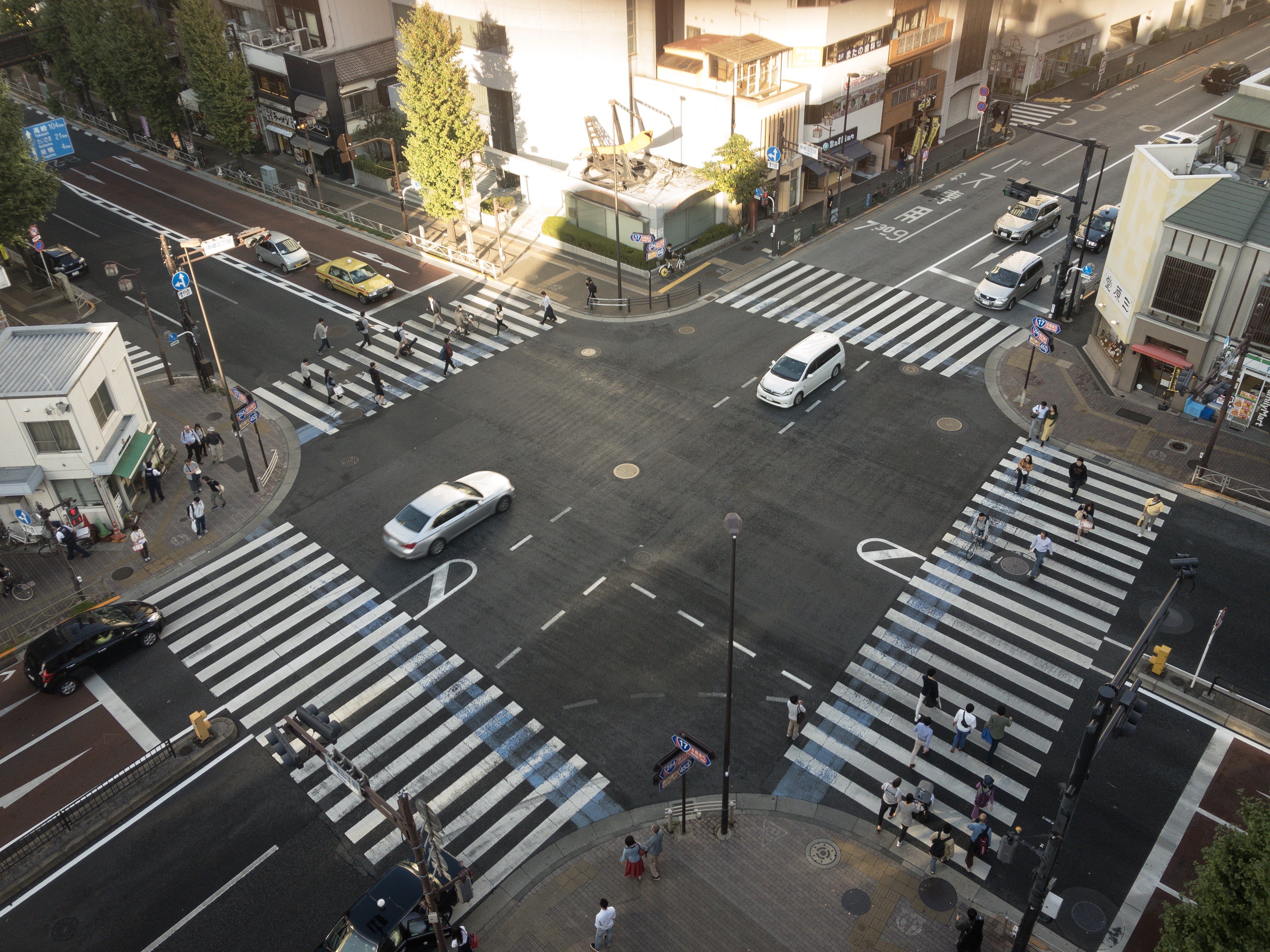 国道17号（左奥が新潟方、右手前が日本橋方）と国道254号（左手前）、東京都道453号本郷亀戸線（右奥）との交差する本郷三丁目交差点